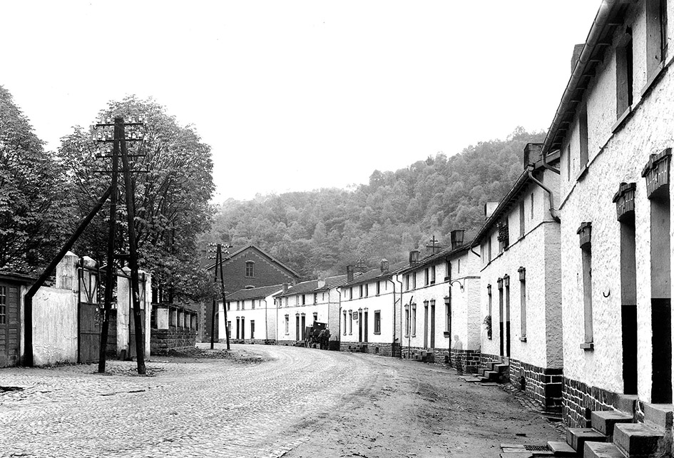 Die „Keimzelle“ der Altenaer Baugesellschaft: Bis 1872 fertiggestellt, stehen die Arbeiterhäuser an der Werdohler Straße in Altena heute unter Denkmalschutz.